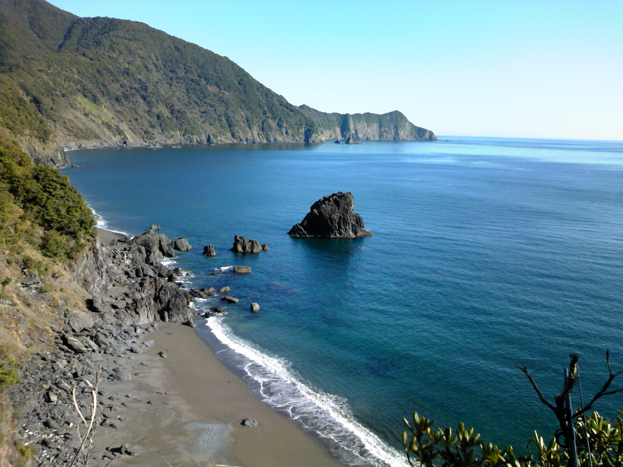 興津